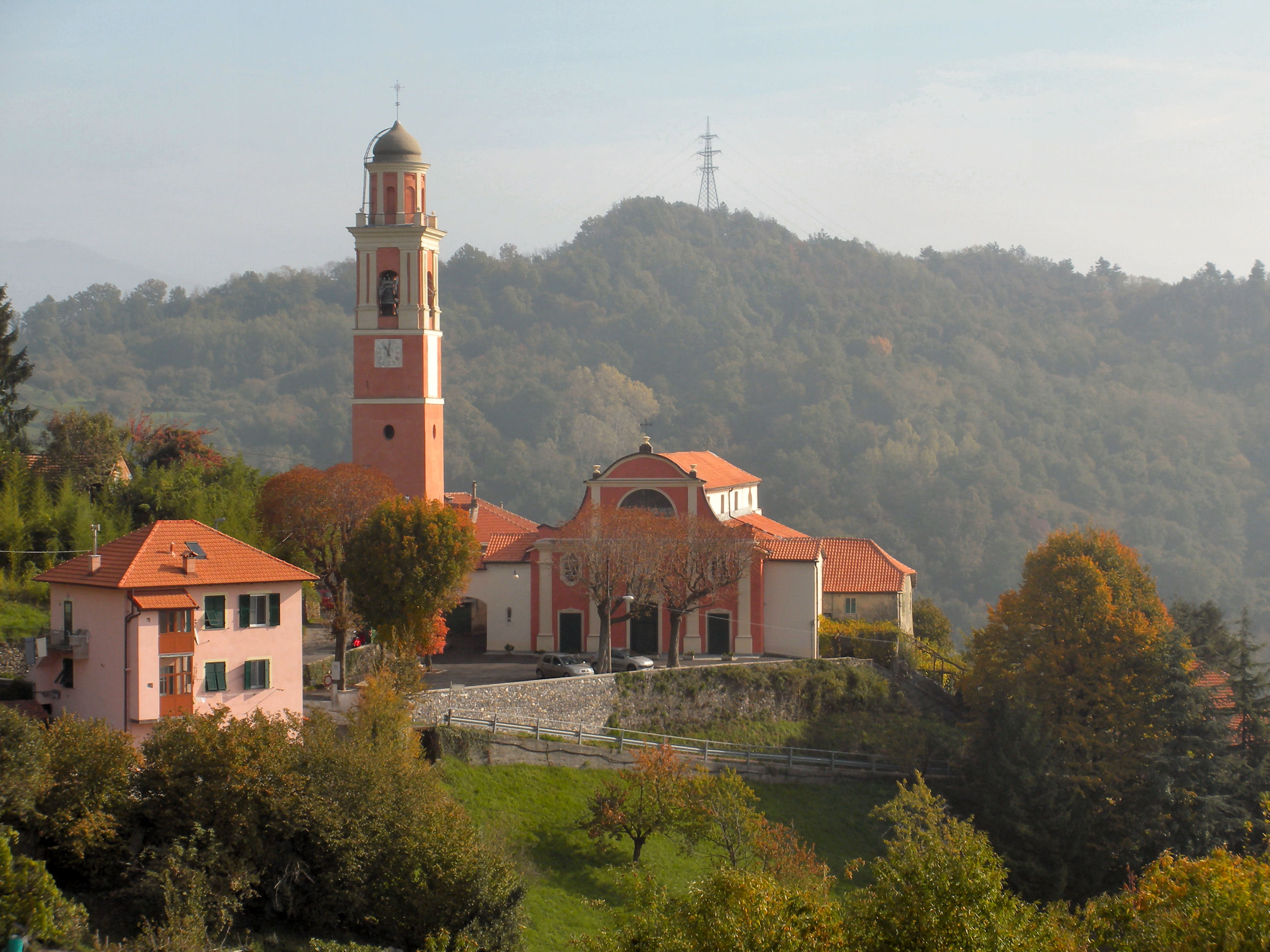 Chiesa di S. Siro a Langasco (Campomorone, Genova) Foto propria Ottobre 2009